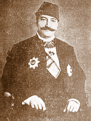 Sarkis Balyan'ın portresi